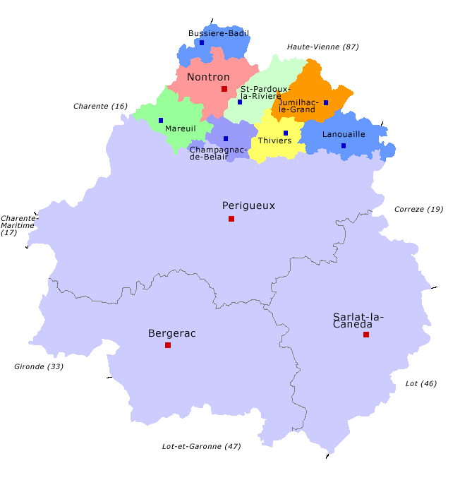 Arrondissement Nontron mit Verwaltungsgiederung und Lage im Département Dordogne